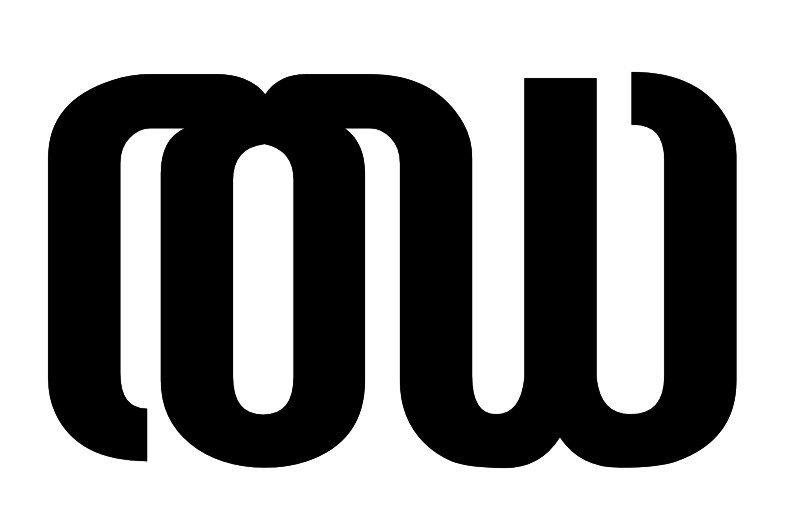 ഝ മലയാളം അക്ഷരം